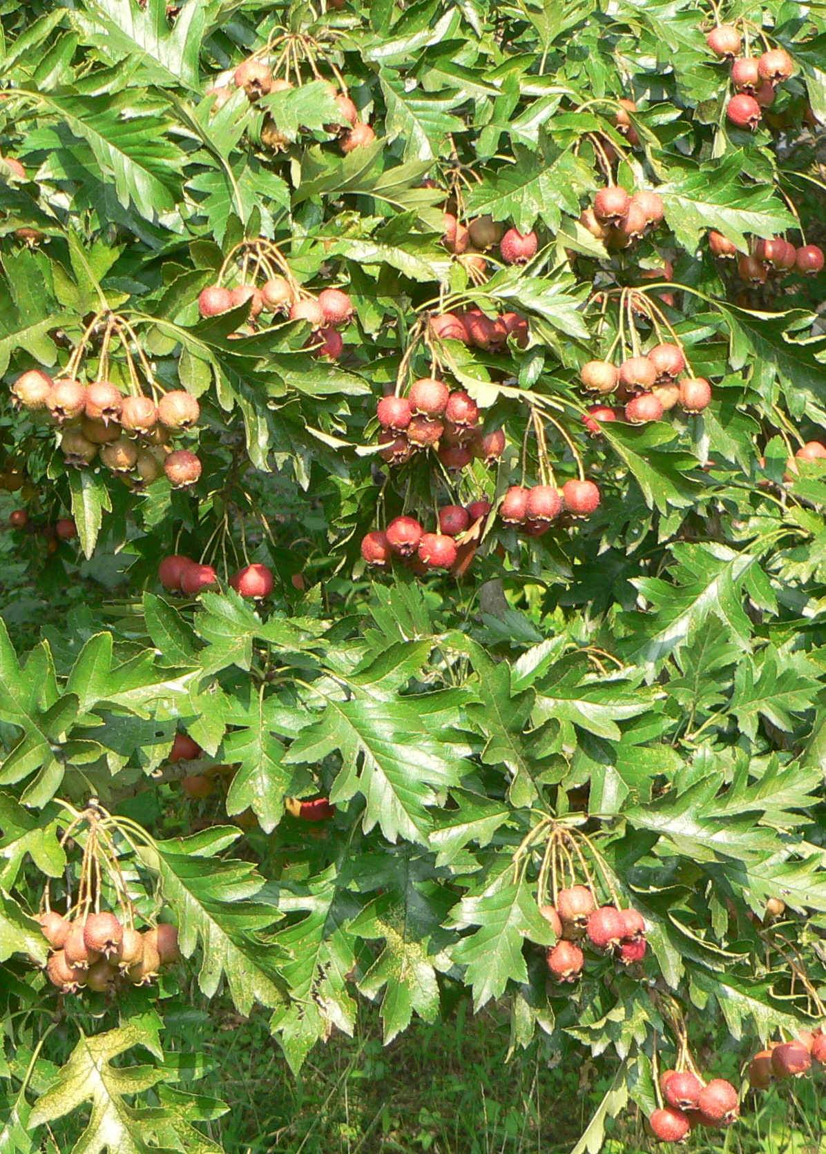 山楂树